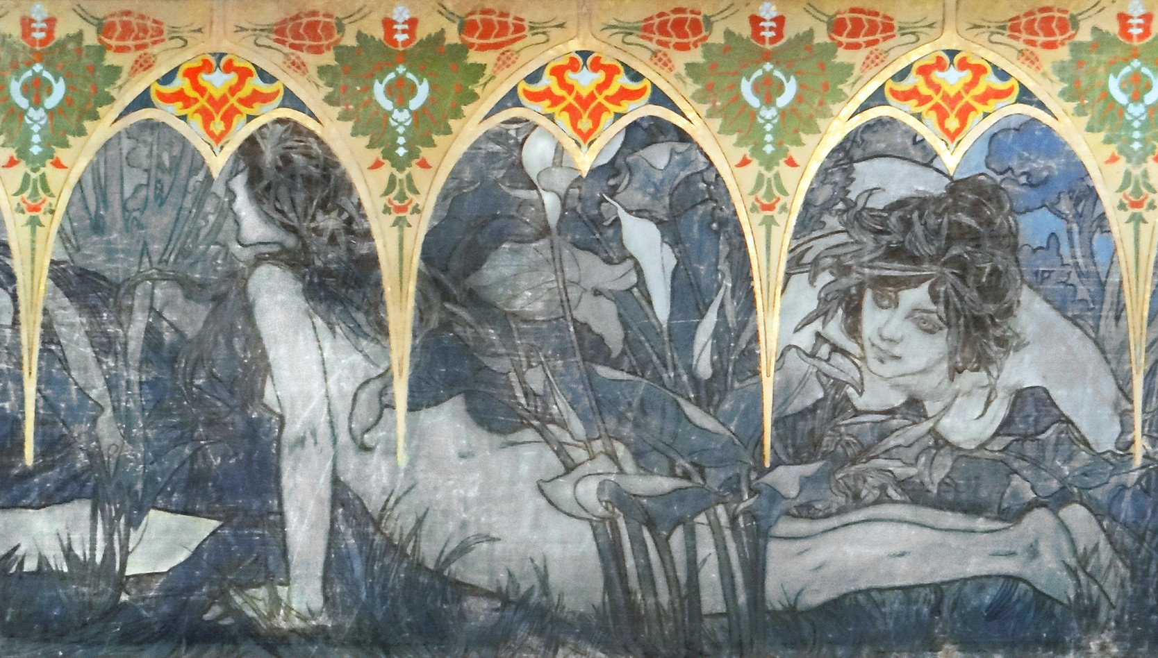 Détail de la frise décorant le pavillon de la Bosnie-Herzégovine à l'Exposition Universelle de 1900 à Paris Oeuvre d'Alfons Mucha (1860-1939) Détrempe sur toile